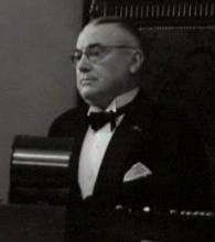 Rad Kortenhorst in 1951